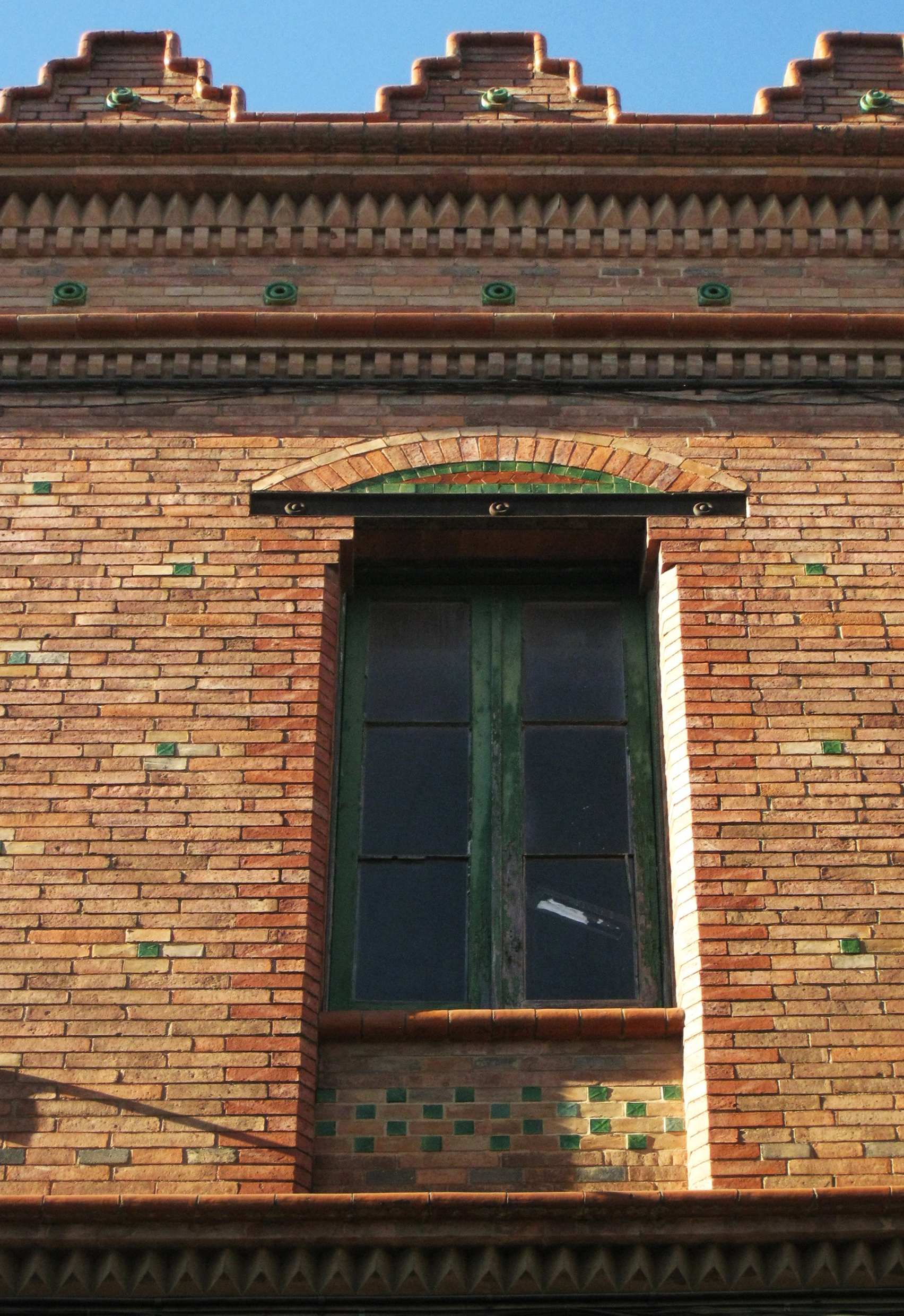 Casa Emili Matalonga, al carrer de Sant Pau núm. 11 (Terrassa). Edifici modernista de Lluís Muncunill, del 1904. A la part del darrere s'hi va situar el magatzem. Detall d'una finestra del pis de dalt, els merlets i els motius decoratius ceràmics de color verd.